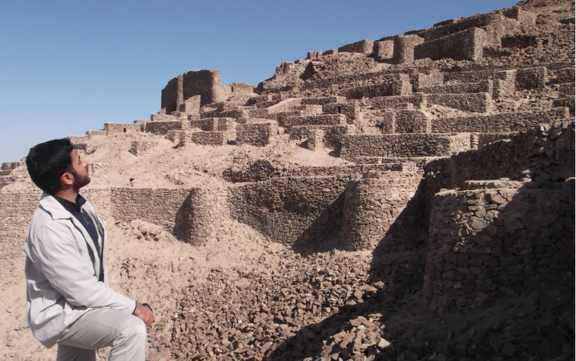 نهبندان،شهر دیرینه های پایدار،شهر خورشید و آفتاب